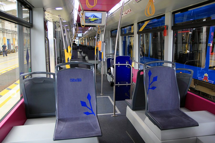 Przedział pasażerski.